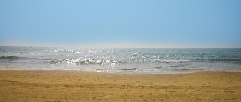 La playa de la marina es de arena fina y dorada, tiene 1,5 kilómetros de longitud y bandera azul.